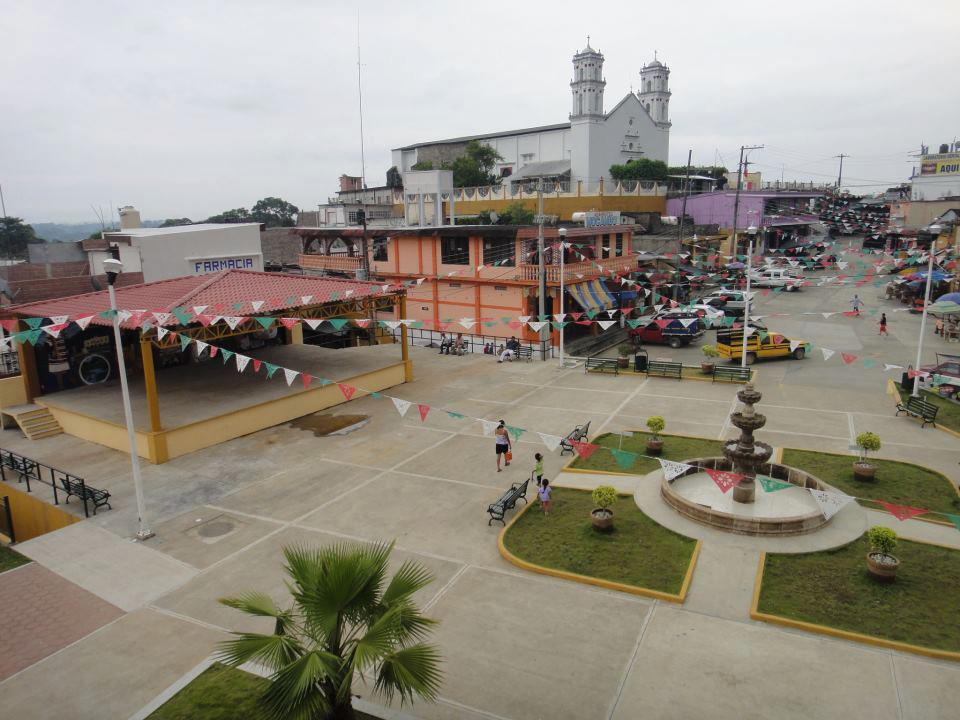 San Felipe Jalapa de Díaz